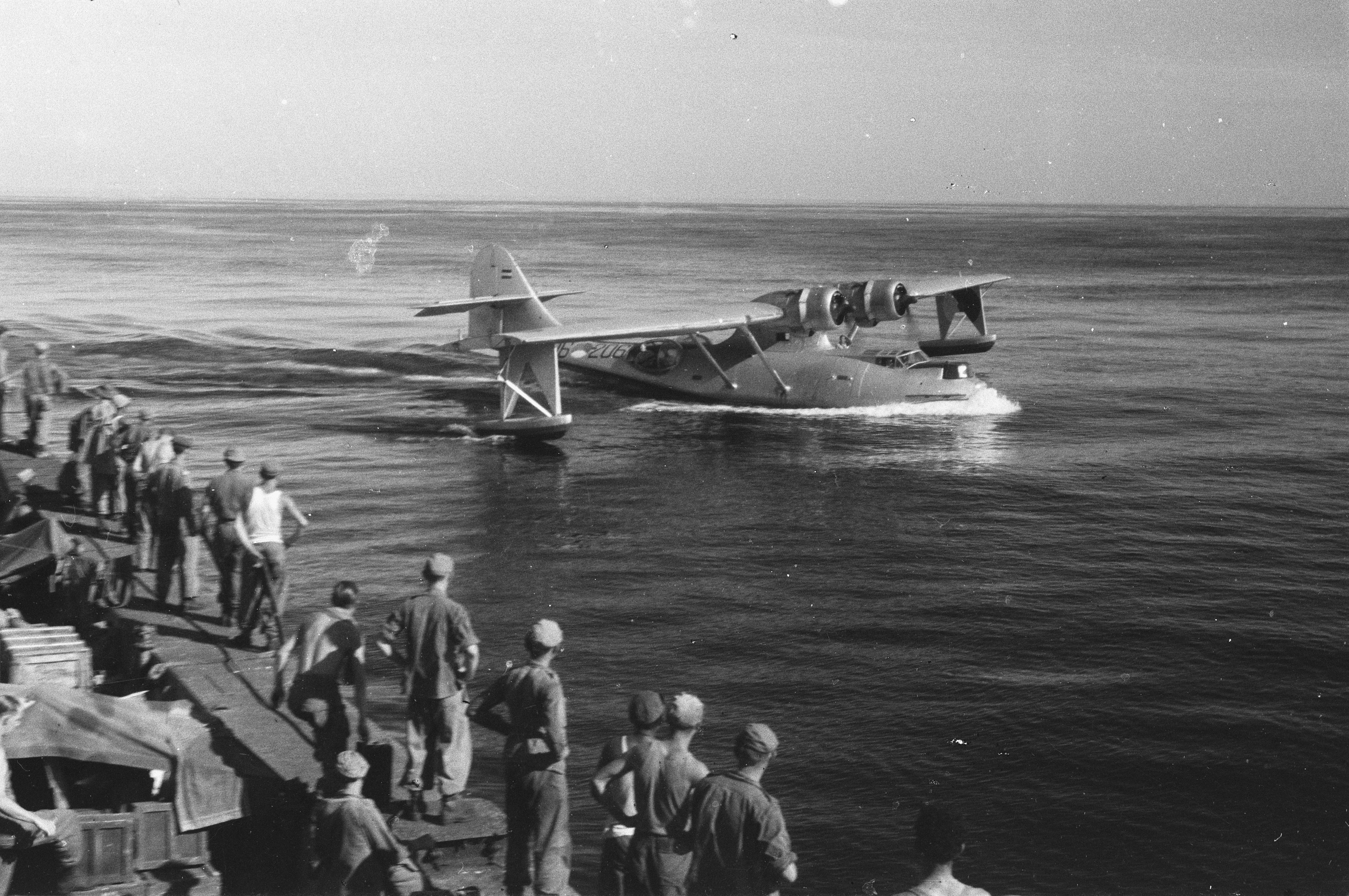 Collectie / Archief : Fotocollectie Dienst voor Legercontacten Indonesië Reportage / Serie : [DLC] Foto's bevrijding Noord-Sumatra Beschrijving : Een Catalina van de MLD strijkt neer naast de LCT's die de troepen vervoerden voor de operatie "Zeeslang", een landing bij Laboehan Bilik op Noord-Sumatra. Datum : 19 december 1948 Locatie : Indonesië, Nederlands-Indië Fotograaf : Fotograaf Onbekend / DLC Auteursrechthebbende : Nationaal Archief Materiaalsoort : Negatief (zwart/wit) Nummer archiefinventaris : bekijk toegang 2.24.04.02 Bestanddeelnummer : 2417